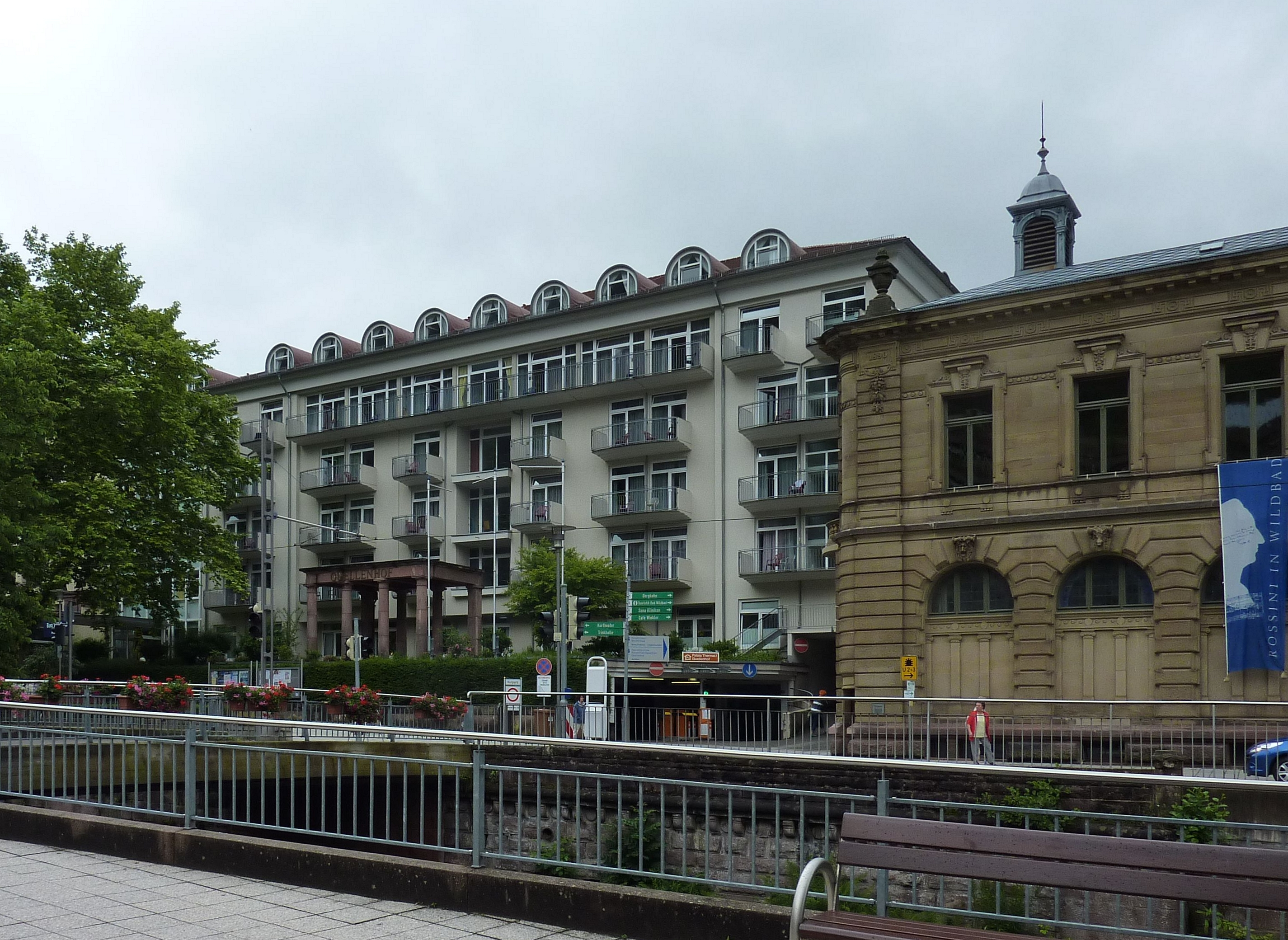 Quellenhof